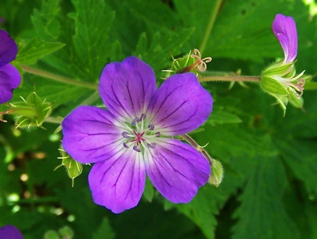 Geranium sylvaticum (pl. bodziszek leśny), habitat: Tatra Mountains, Dolina Kościeliska